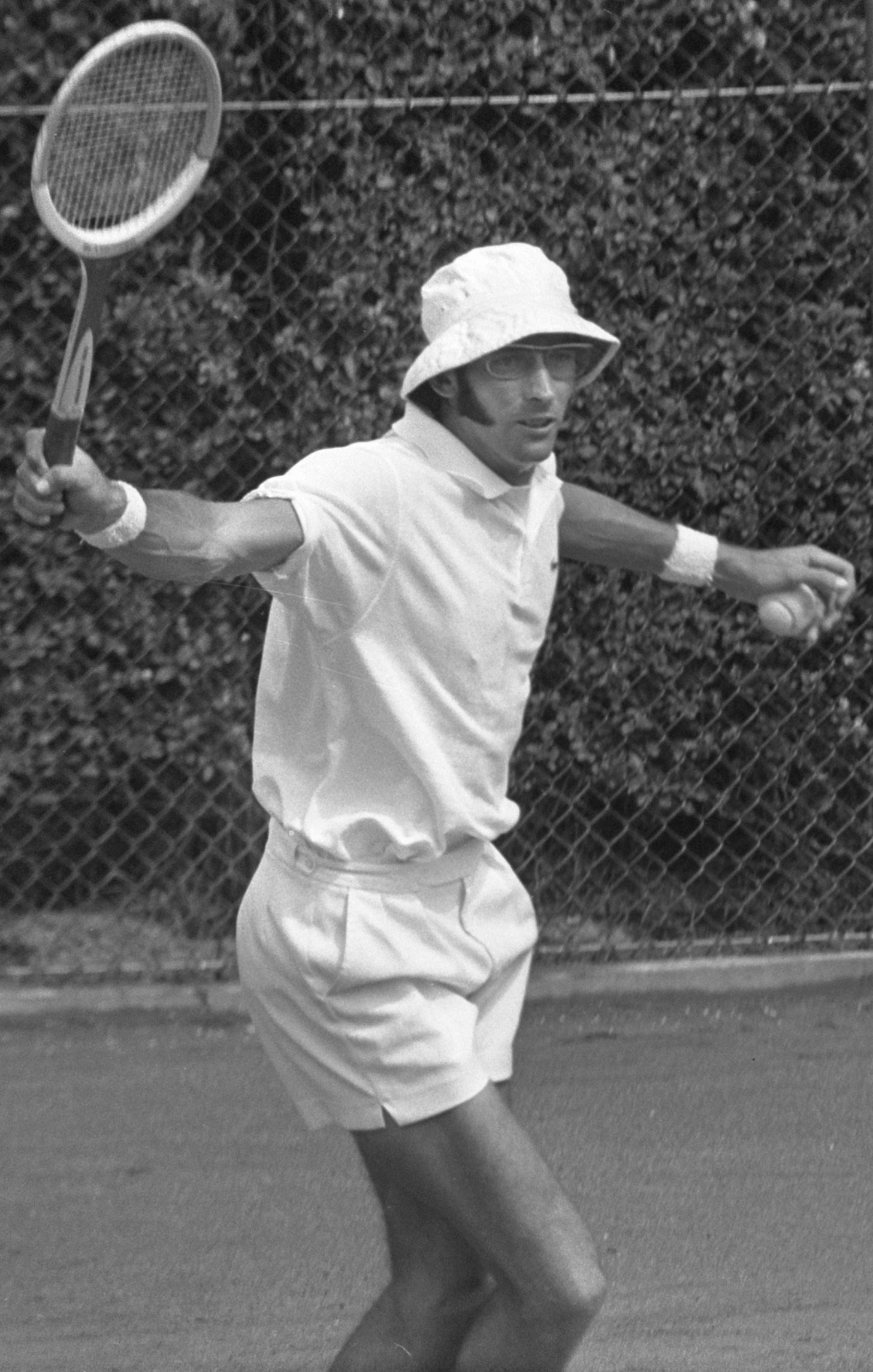 Internationale tenniskampioenschappen in Hilversum ('t Melkhuisje ); K. Diepraam (Zuid-Afrika) in aktie 29 juli 1970